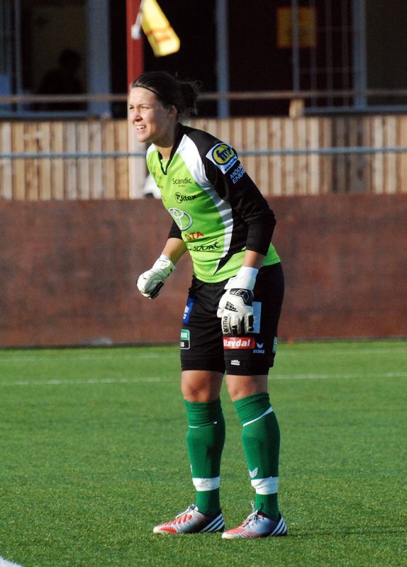 Minna Meriluoto